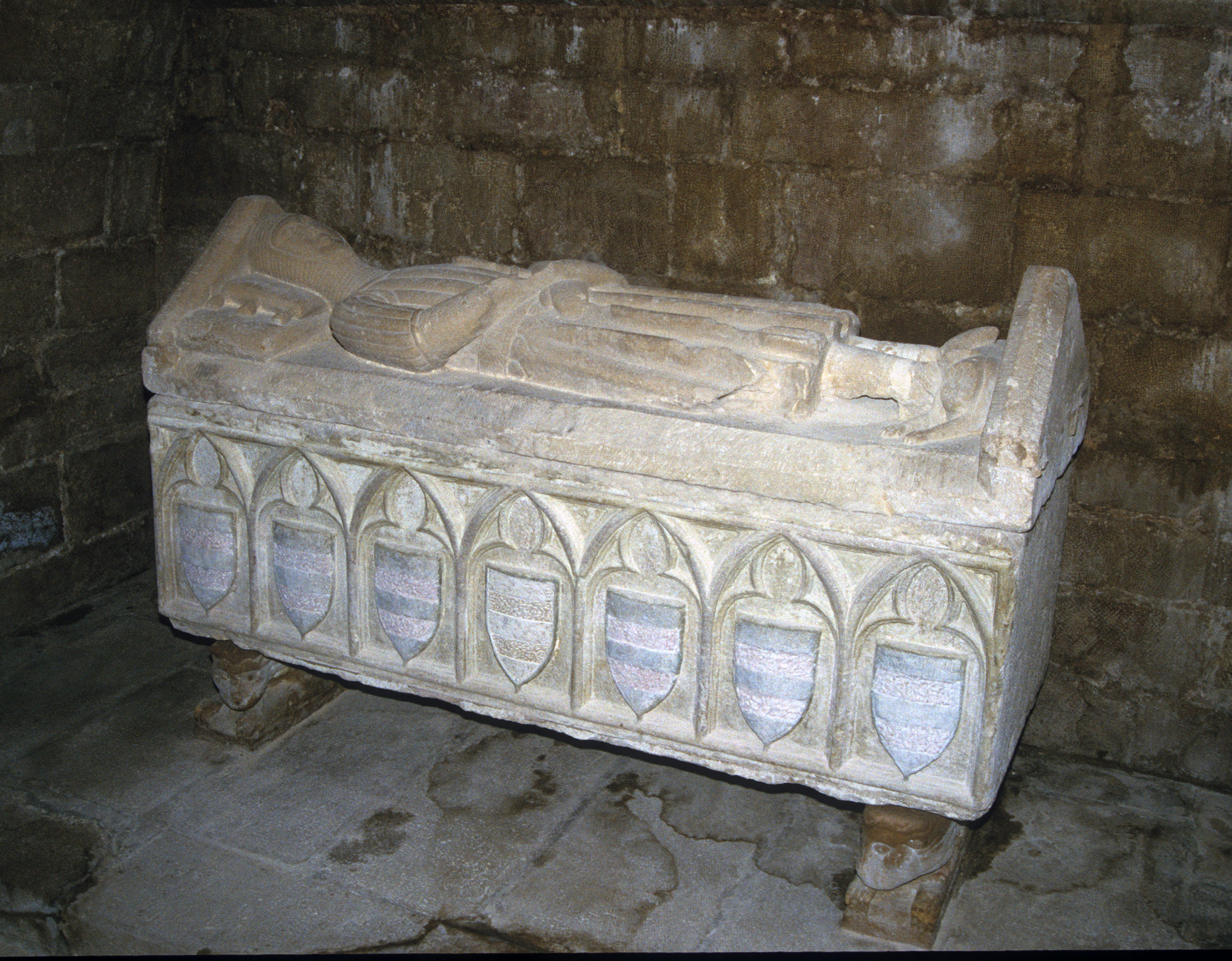 Sarcòfag d'un Guimerà. Església de Sant Miquel de Ciutadilla (Urgell)